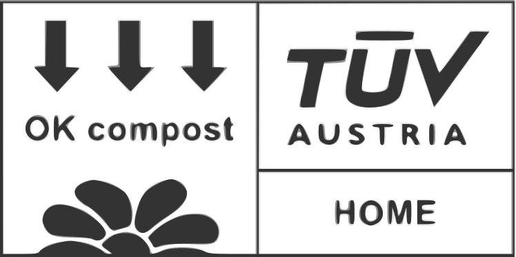 Représente le logo visible sur les sacs en plastique partiellement biosourcé compostable à domicile par compostage domestique. La marque de conformité OK compost HOME peut être appliquée sur un produit uniquement si ce produit a été formellement certifié par TÜV AUSTRIA.